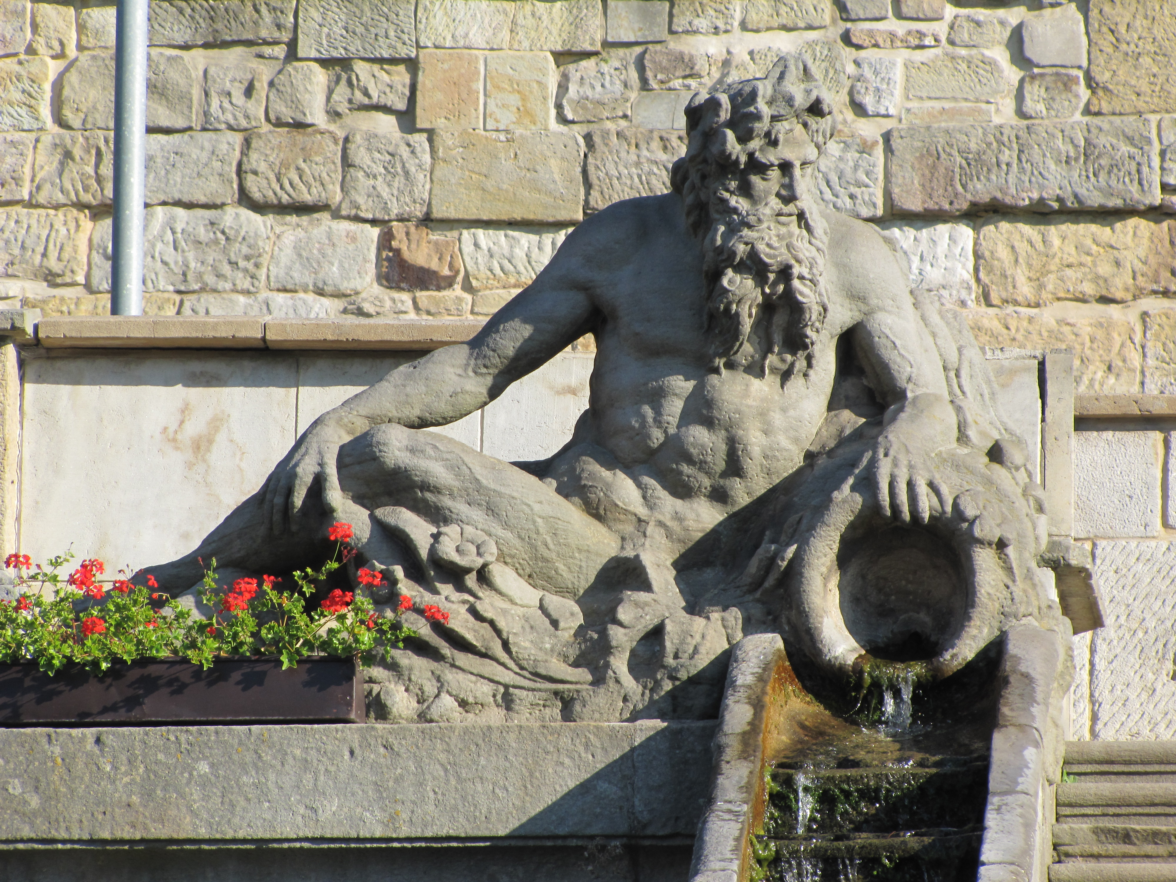 Jeden z Tritonů na schodišti torza zámku v Kuksu